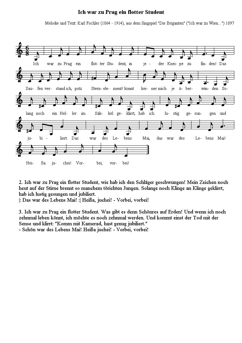 Studentenlied. Das Lied wurde statt mit der Zeile "ich war zu Prag" auch mit "zu Wien" oder "zu Graz" gesungen.